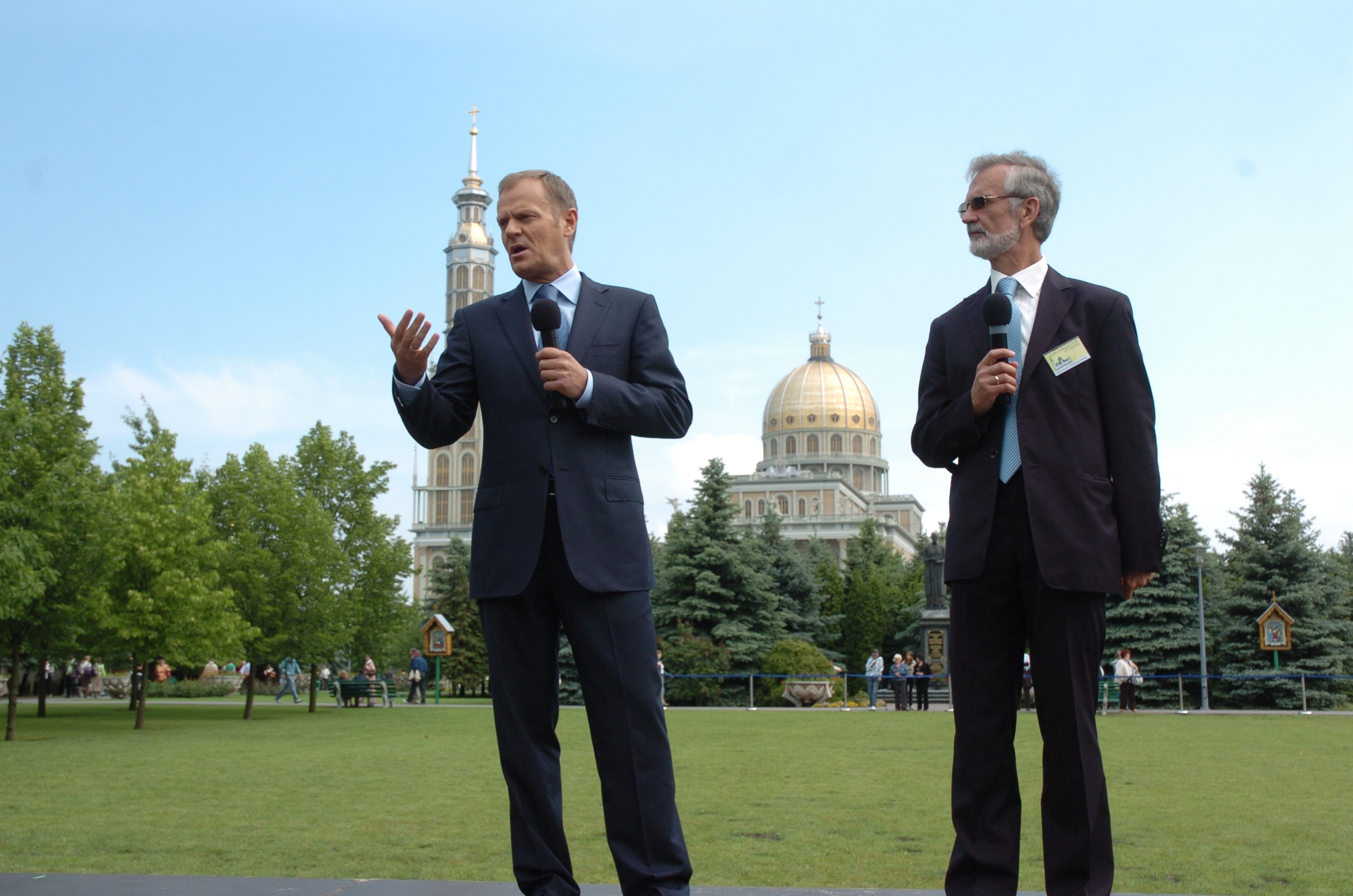 Premier Donald Tusk i poseł Ireneusz Niewiarowski podczas Ogólnopolskiej Pielgrzymki Sołtysów i Środowisk Wiejskich w Licheniu